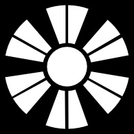 日足紋